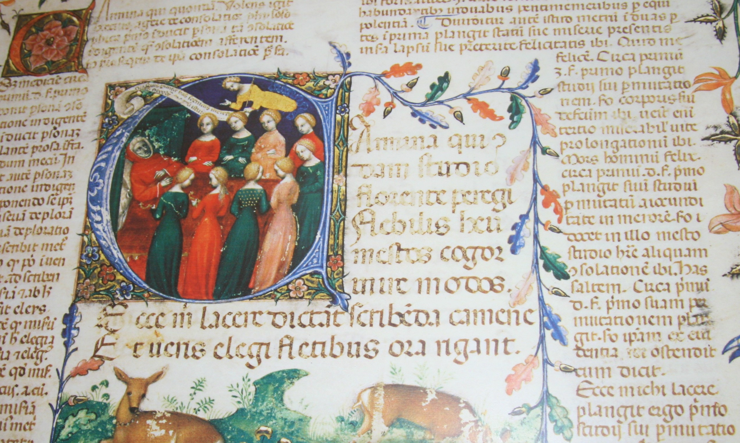 Biblioteca Malatestiana This is a photo of a monument which is part of cultural heritage of Italy.